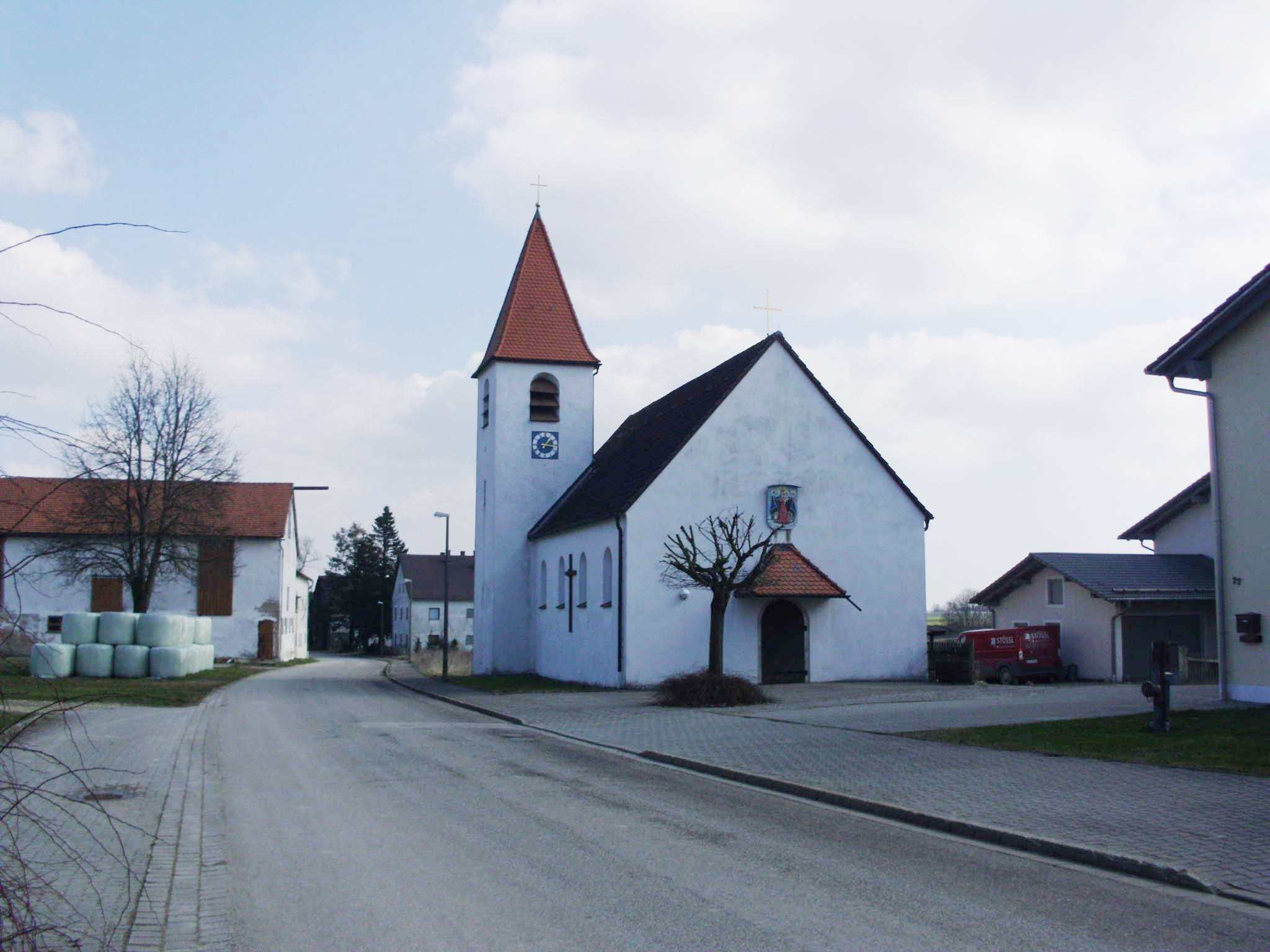 Langensallach, Gemeinde Schernfeld im Landkreis Eichstätt (Bayern), Dorfkirche "Maria, Dreimal Wunderbare Mutter", 1949, Architekt: Friedrich Haindl, München